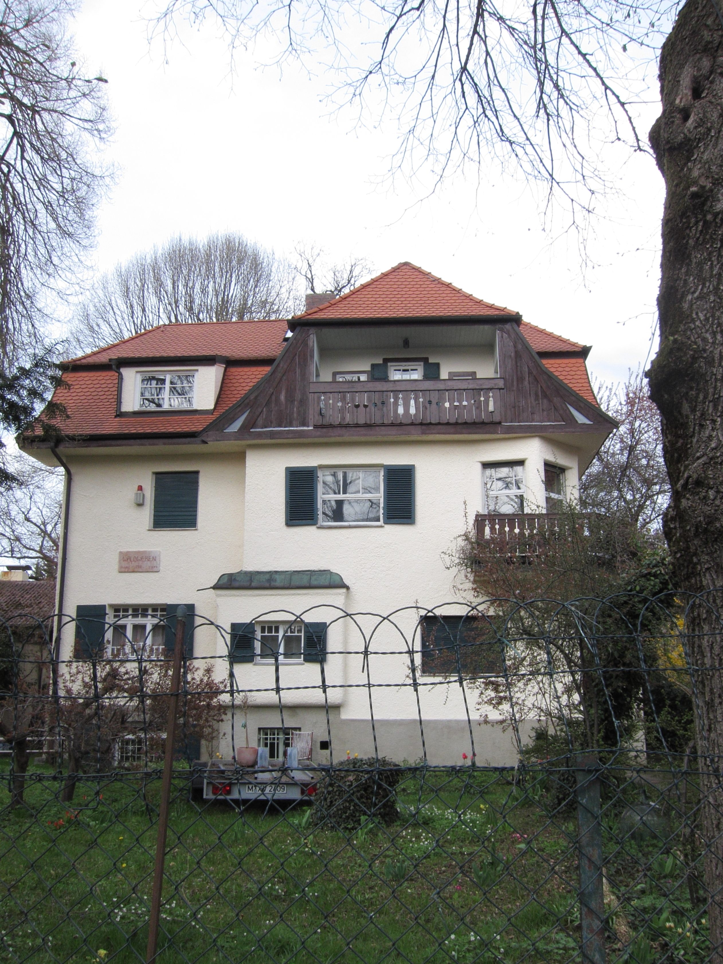 Pfeivestlstraße 32; Villa Waldweben von Baron Trotha, historisierend, bez. 1910, von Joseph Schermüller.